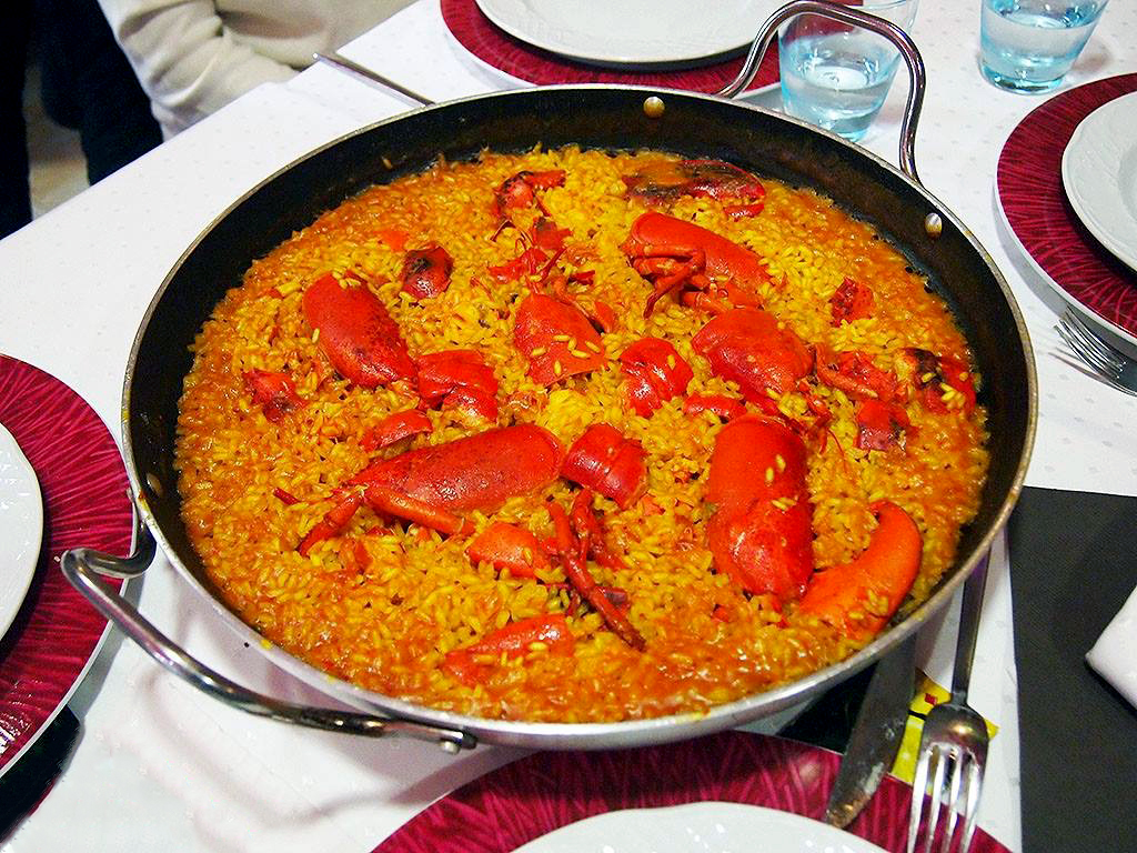 Paellera de Arroz con llubricante